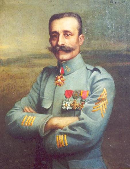 Portrait d'Henri Savatier (1855-1952).